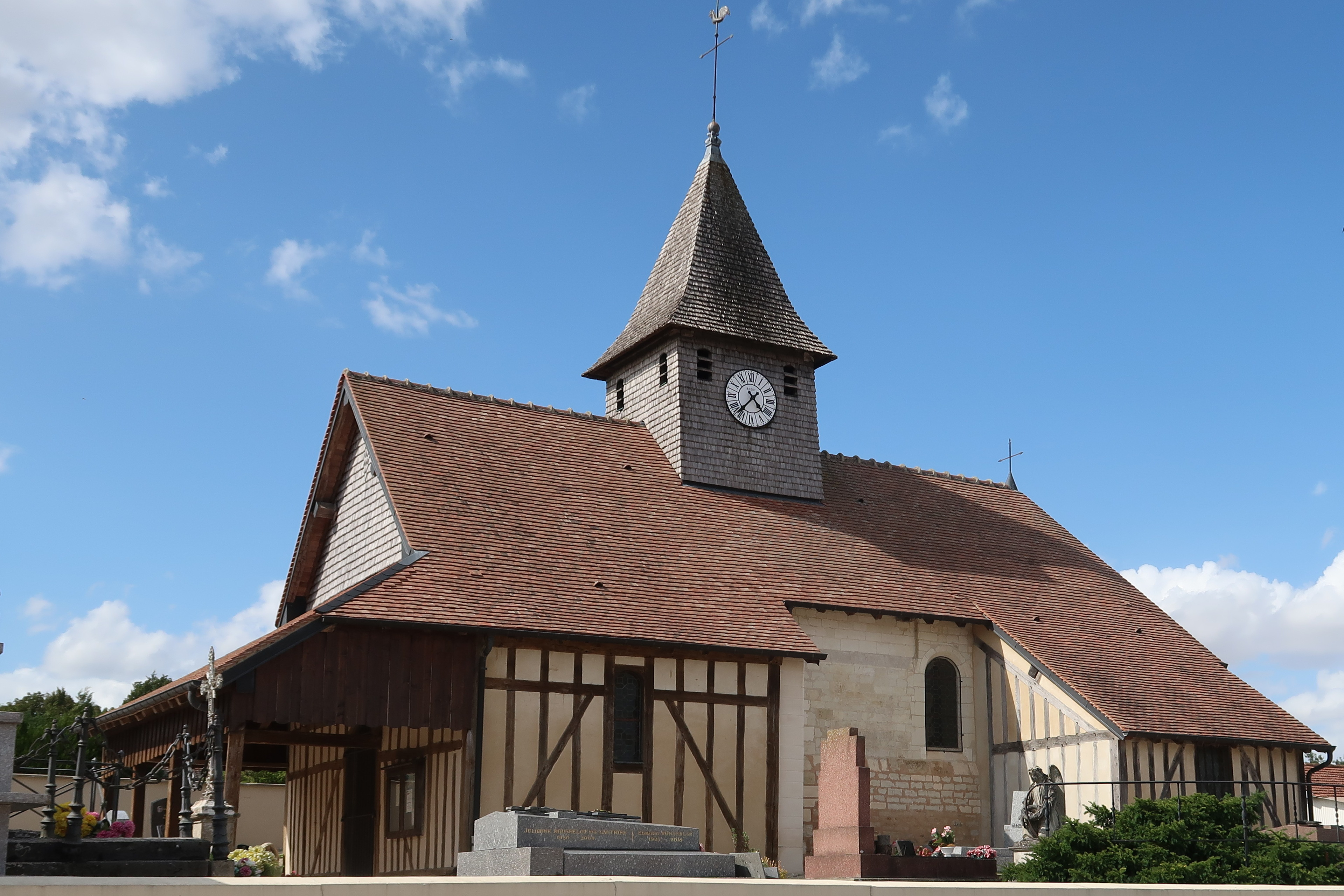 Pars-lès-Chavanges, église